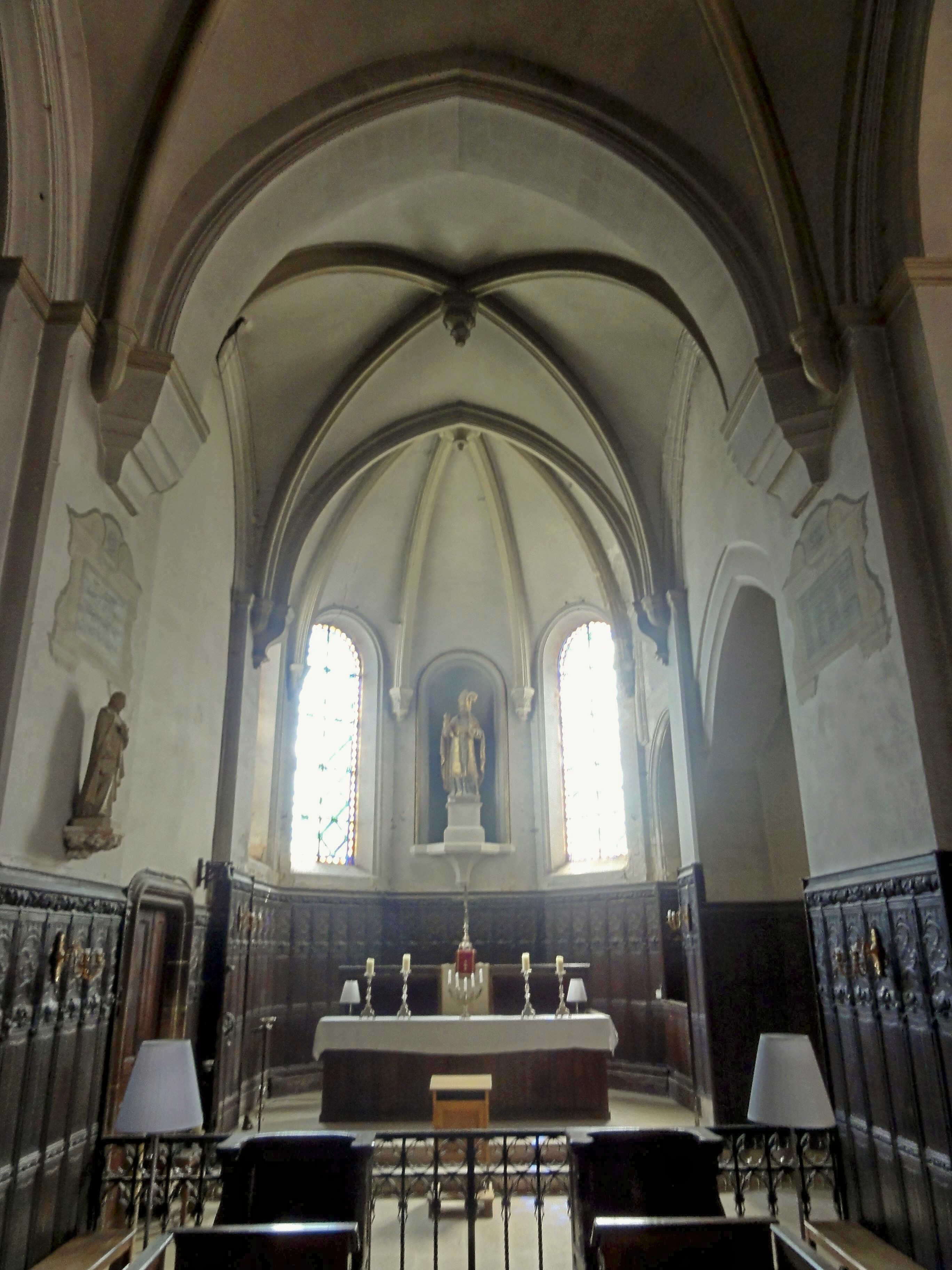 Chœur.